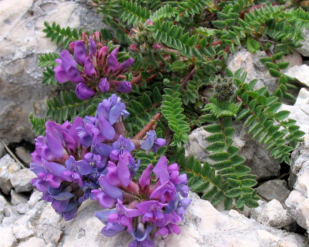 Pirinejska osivnica nad planino Razor.